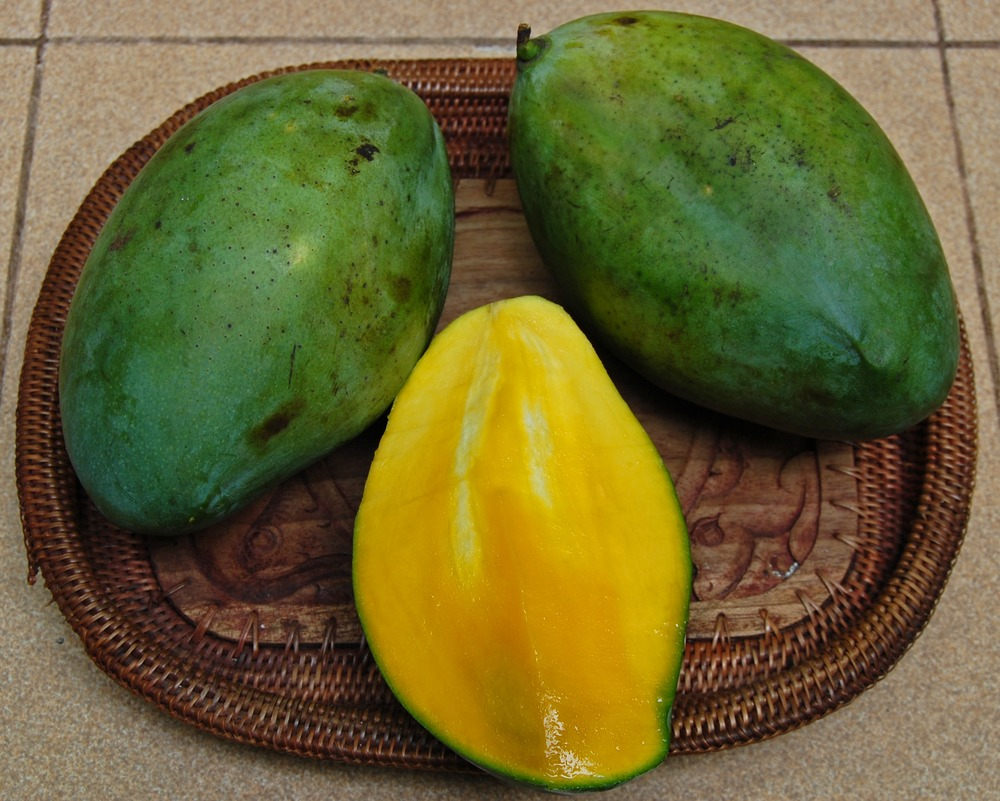 Mangga manalagi situbondo, a kind of mango, Mangifera indica from Situbondo, East Java, Indonesia